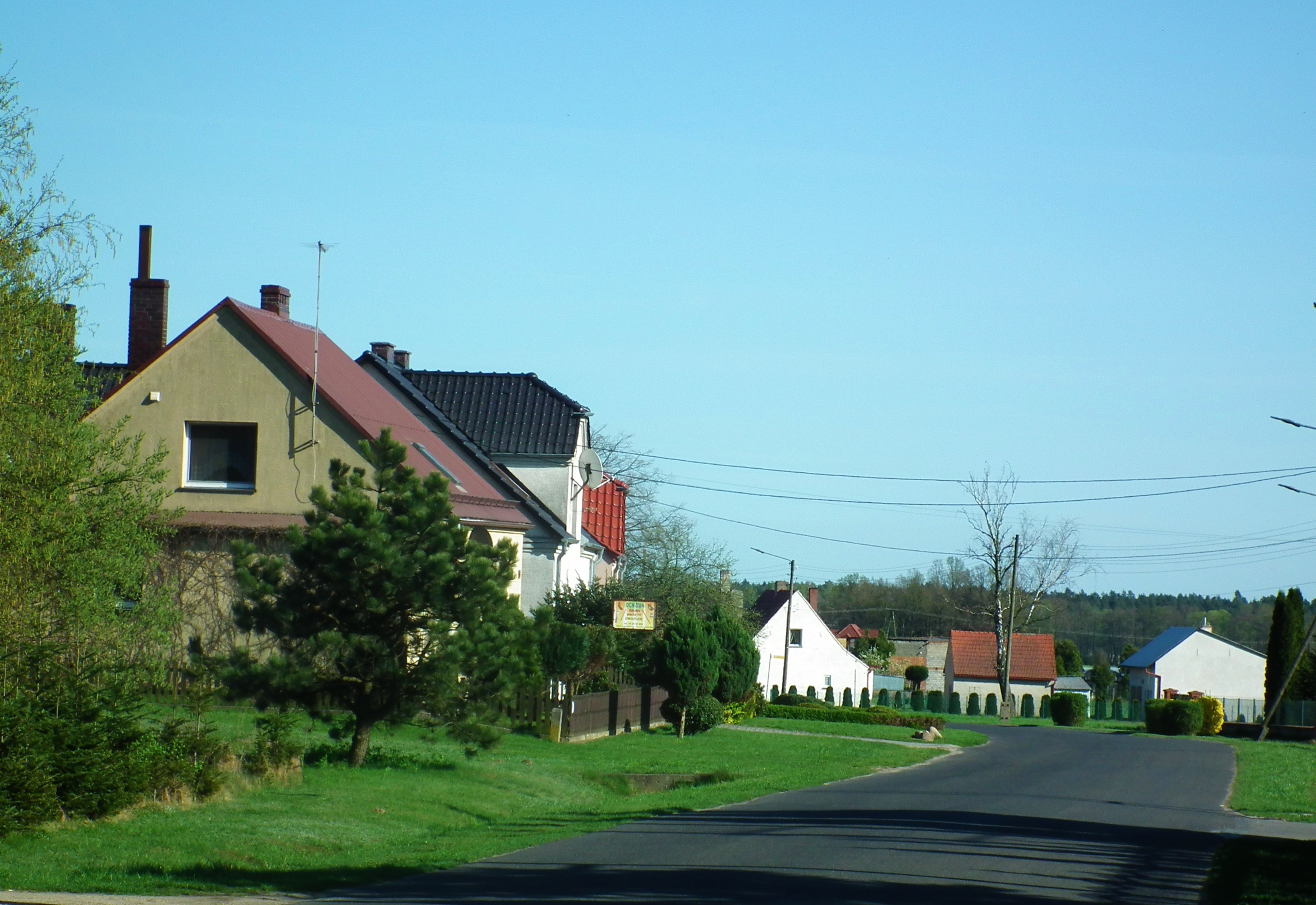 Wieś Jeżowa w woj. śląskiem.